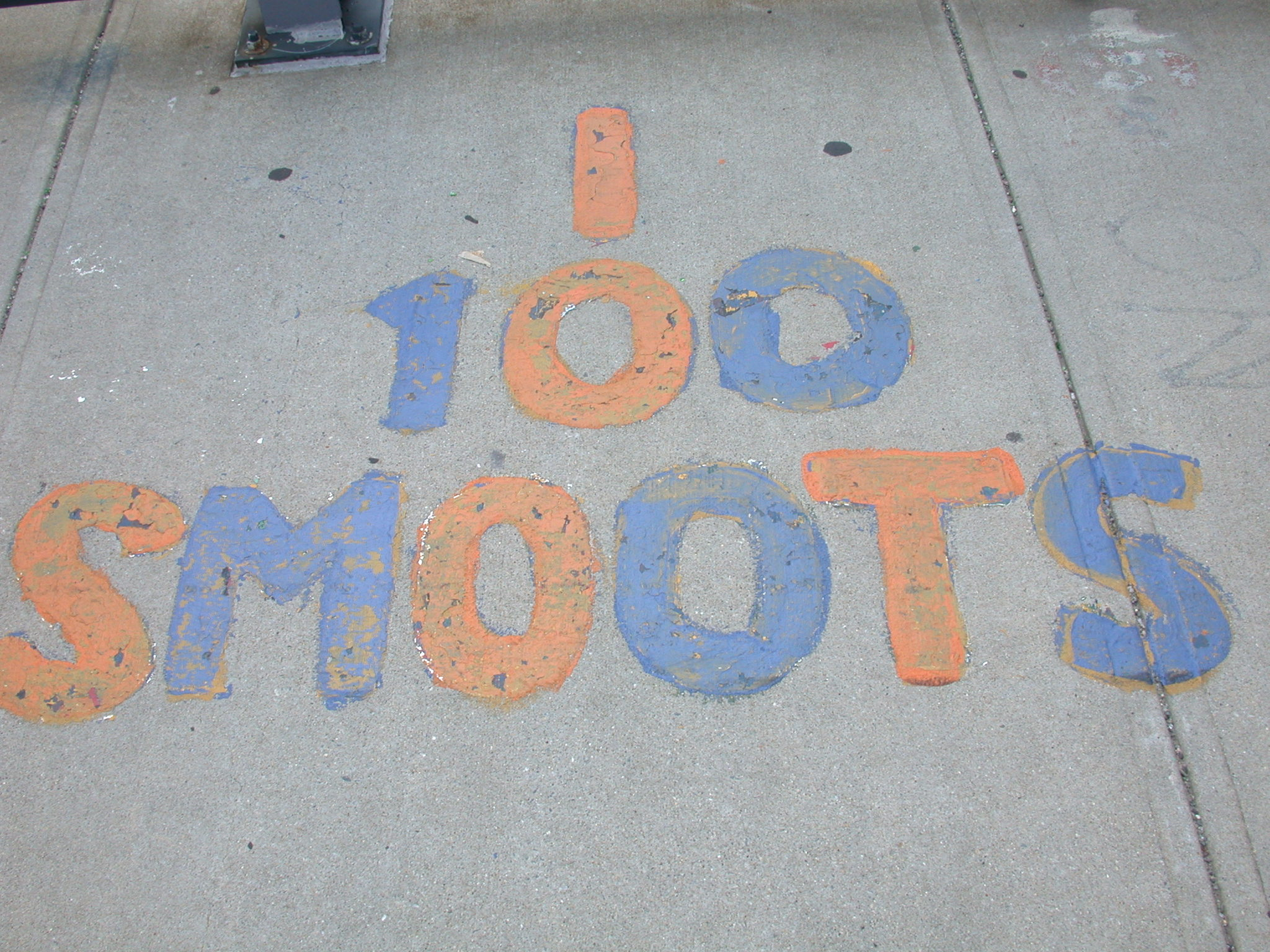 100-Smoot marking on Harvard Bridge